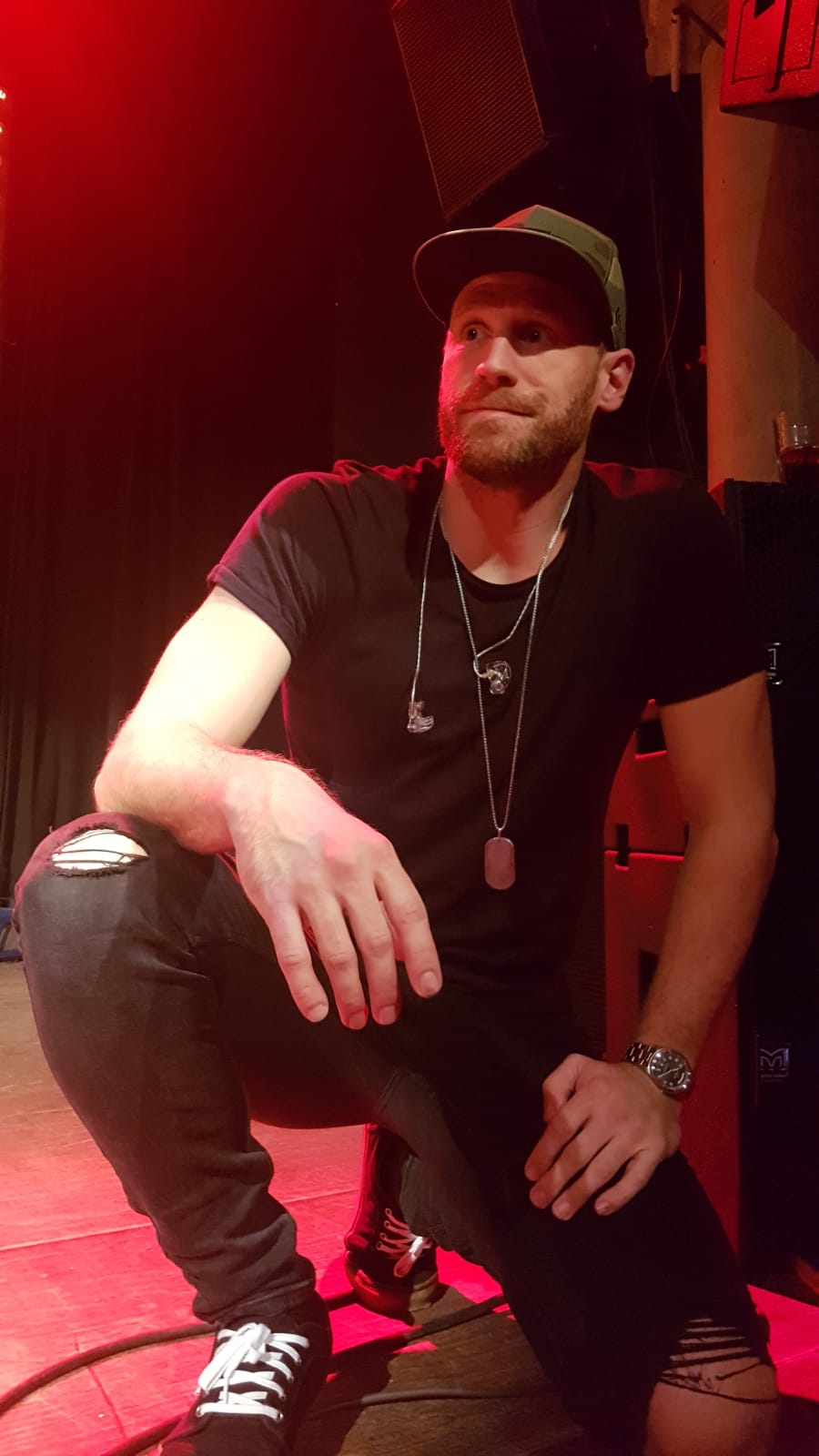 Chase Rice im Mojo Club 2020.